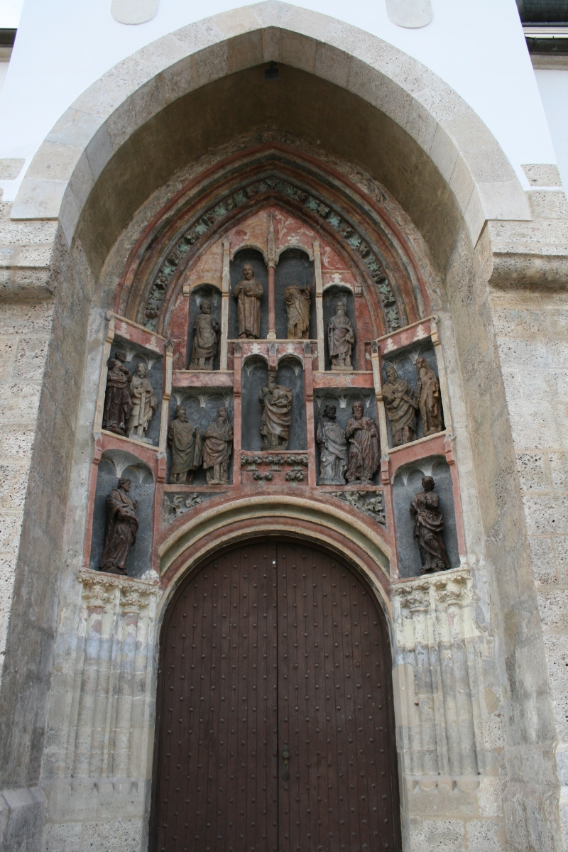 Južni portal crkve svetog Marka u Zagrebu